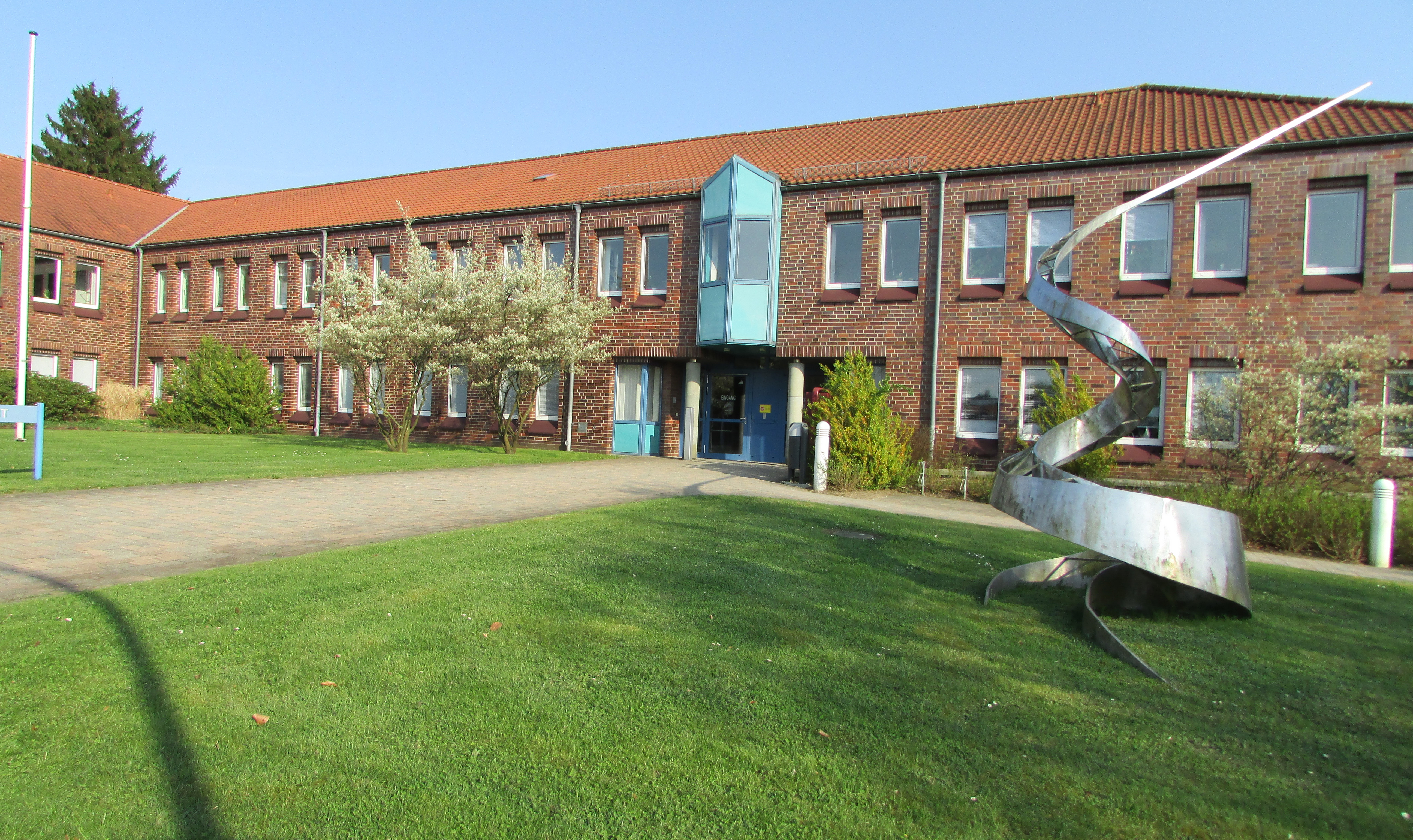 Gebäude des Amtsgerichts Schwarzenbek NOTE: This image is a panorama consisting of 2 frames that were merged in software. As a result, this image necessarily underwent some form of digital manipulation. These manipulations may include blending, blurring, cloning, and color and perspective adjustments. As a result of these adjustments, the image content may be slightly different than reality at the points where multiple images were combined. This manipulation is often required due to lens, perspective, and parallax distortions.